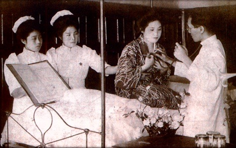 高敬遠醫官與護士為患者看診。